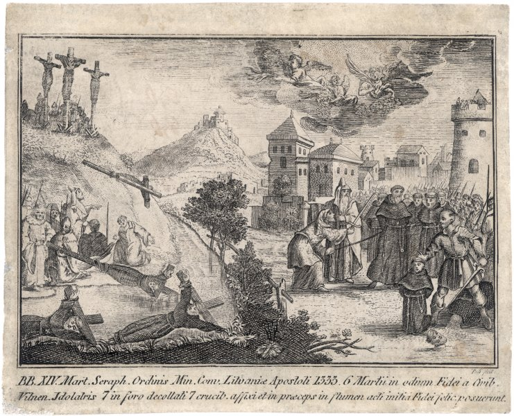 Беларуская (тарашкевіца): Вільня (Vilnia)